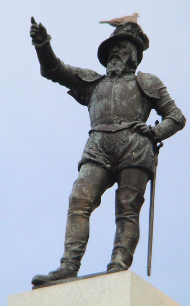 Pomnik w St. Augustine na Florydzie. Autor zdjęcia: Meerakh